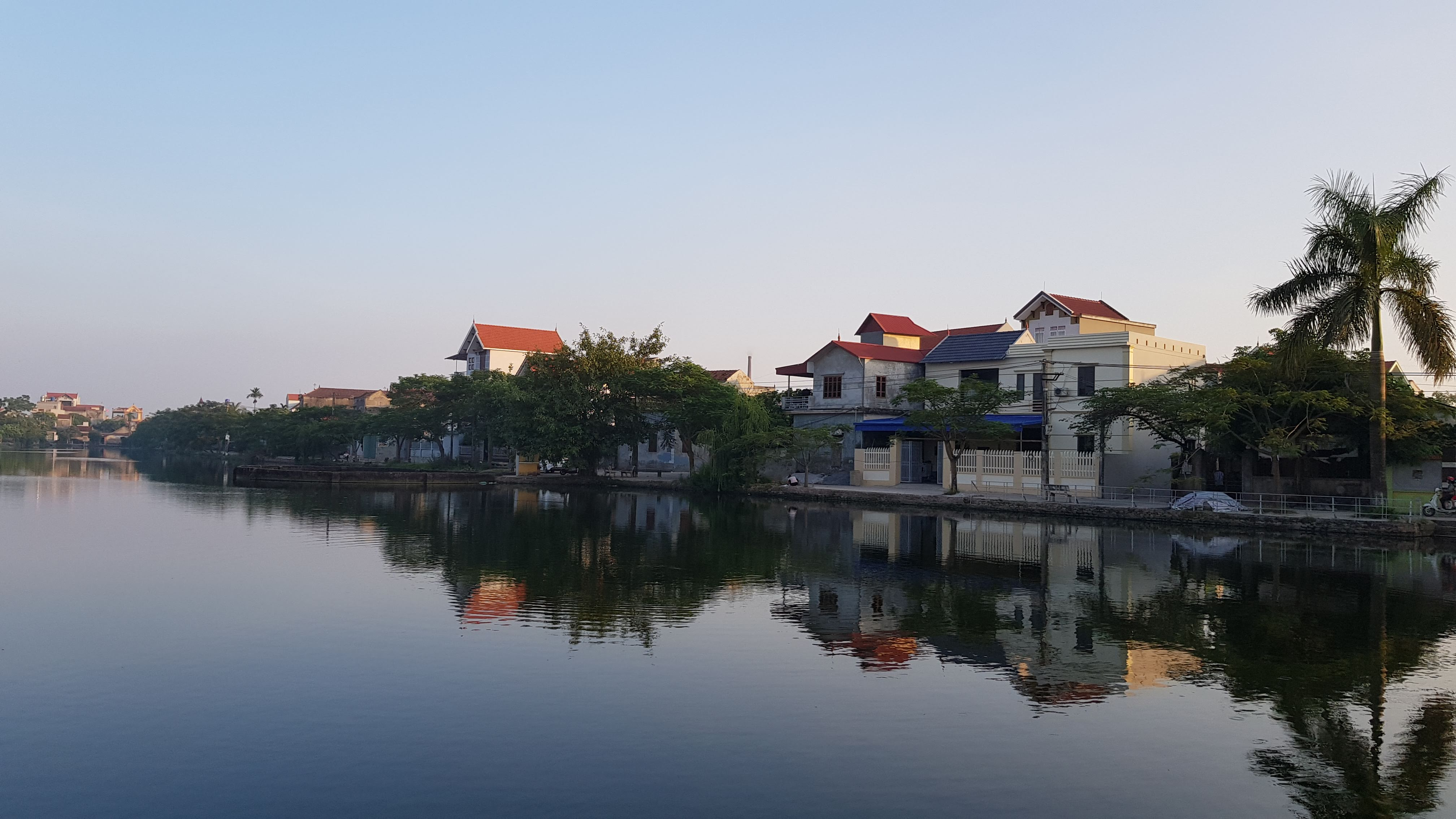 Thôn Trung Châu - xã Đông Kết - huyện Khoái Châu - tỉnh Hưng Yên